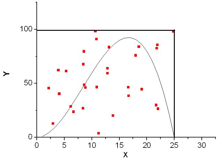 МК-интегрирование